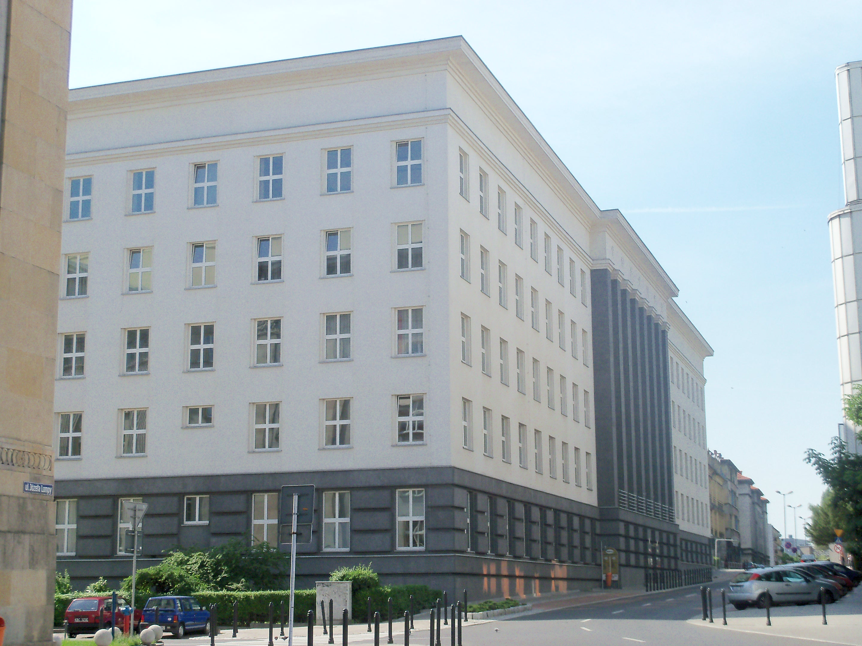 Dawny gmach Syndykatu Polskich Hut Żelaznych przy ul. Józefa Lompy w Katowicach